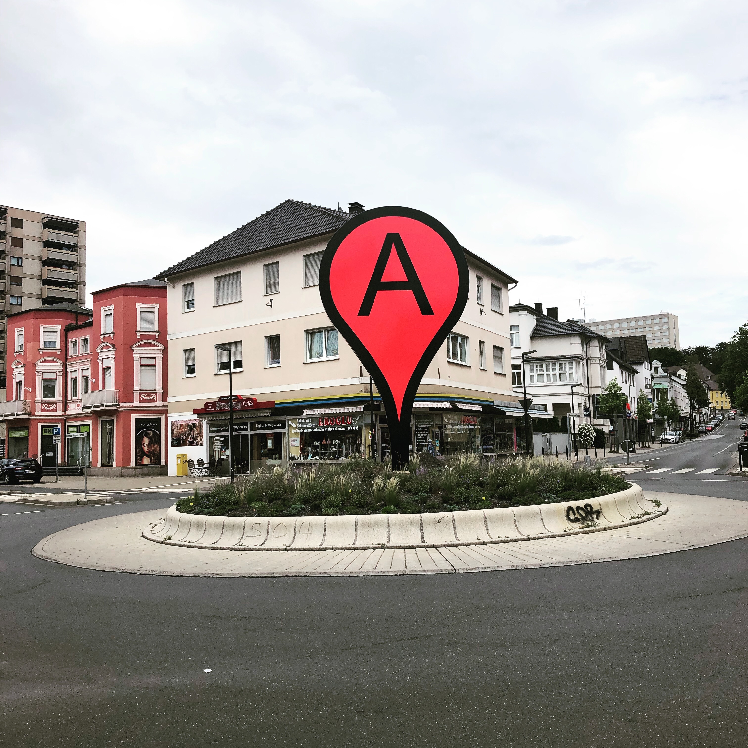 Aram Barthol "Map." Dauerhafte Instalation in Arnsberg